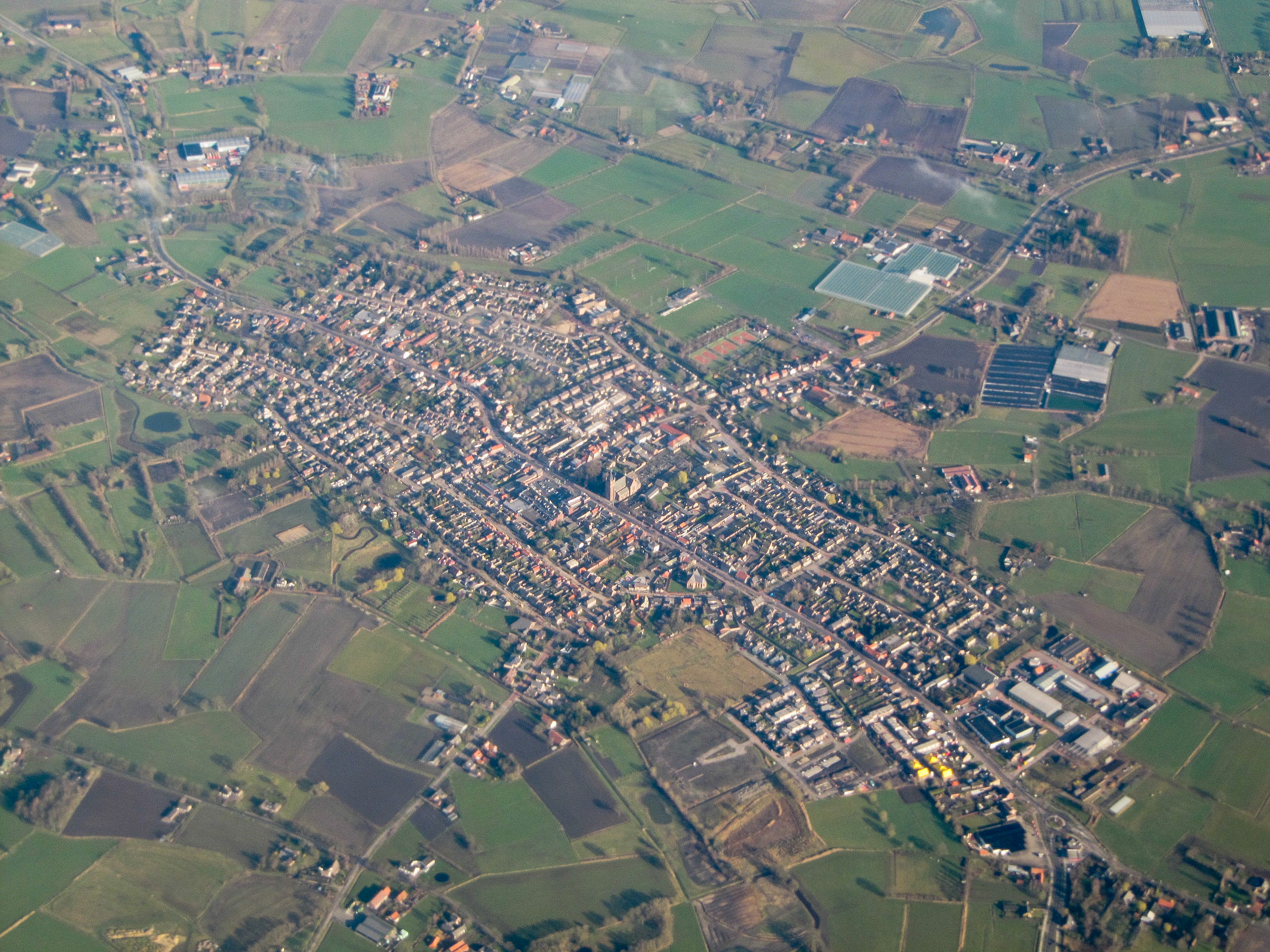 Chaam